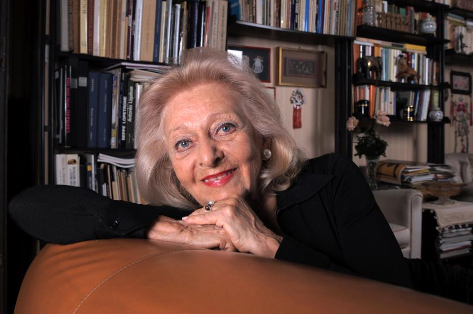 Susanna Egri